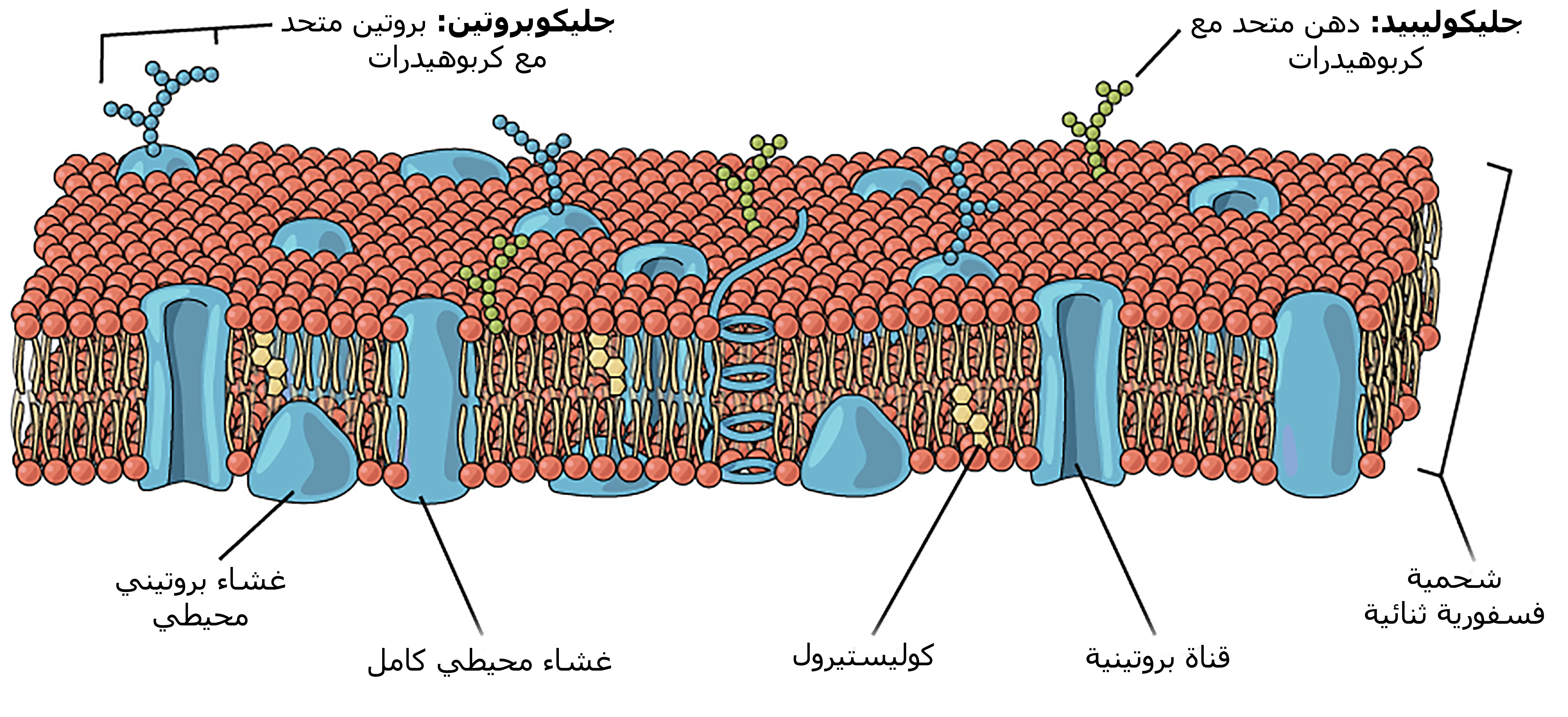 .طبقة ثنائية فوسفورية تحتوي على العديد من المكونات الجزيئية المختلفة، بما في ذلك البروتينات والكوليسترول، بعضها متحد مع مجموعة الكربوهيدرات